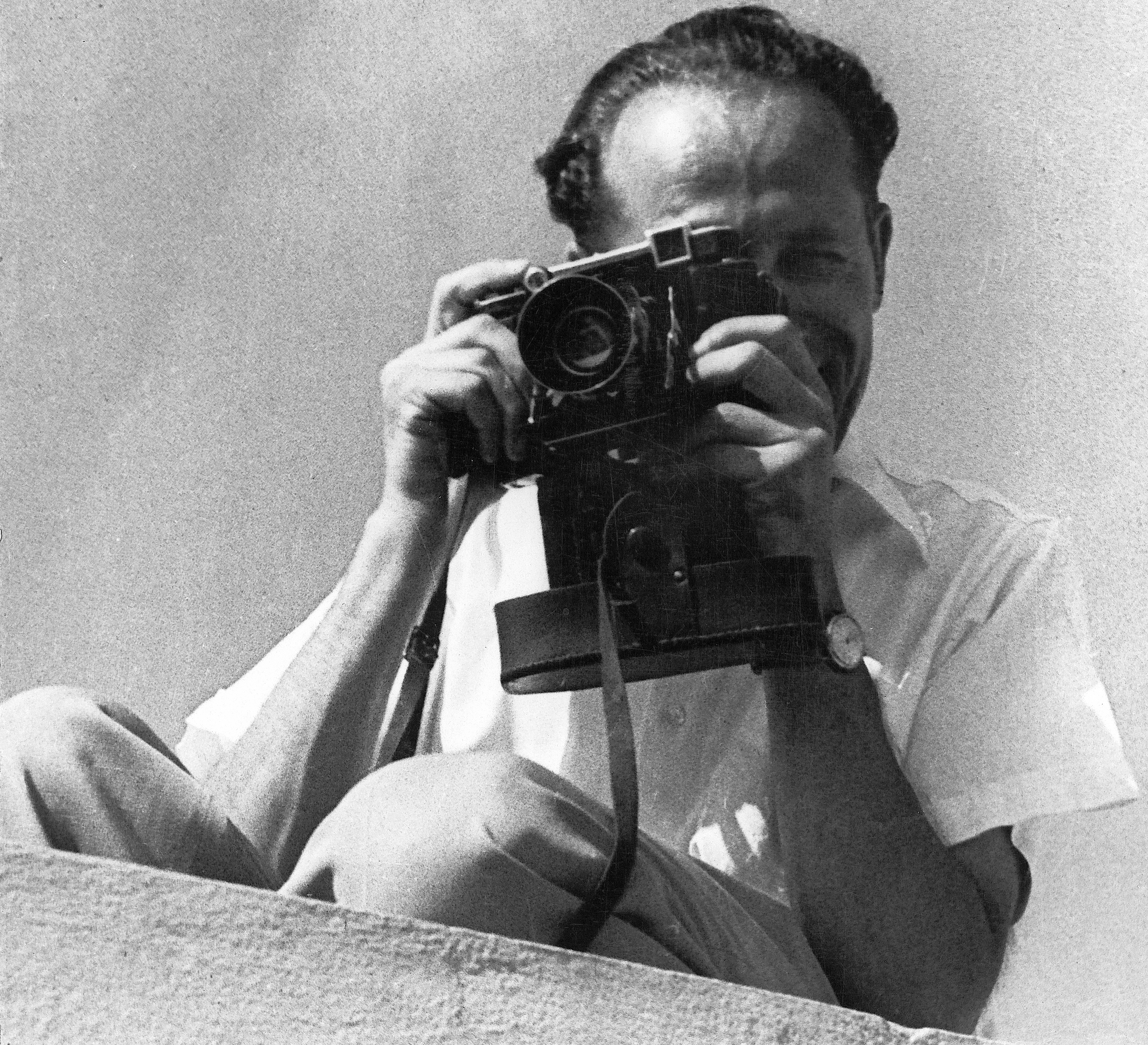 רודי ויסנשטין 1940